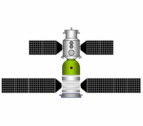 Шънджоу